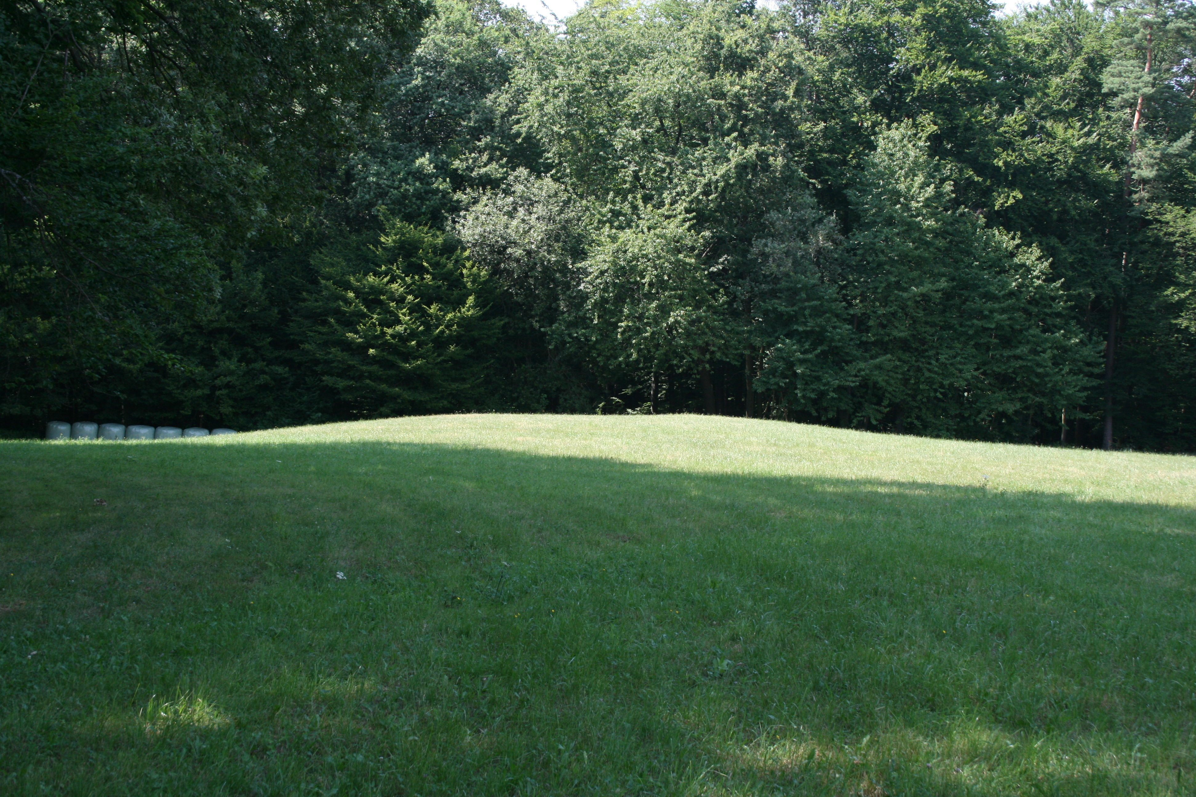 Kastell Lützelbach am Odenwaldlimes. In dem Hügel befindet sich das Kastellbad.